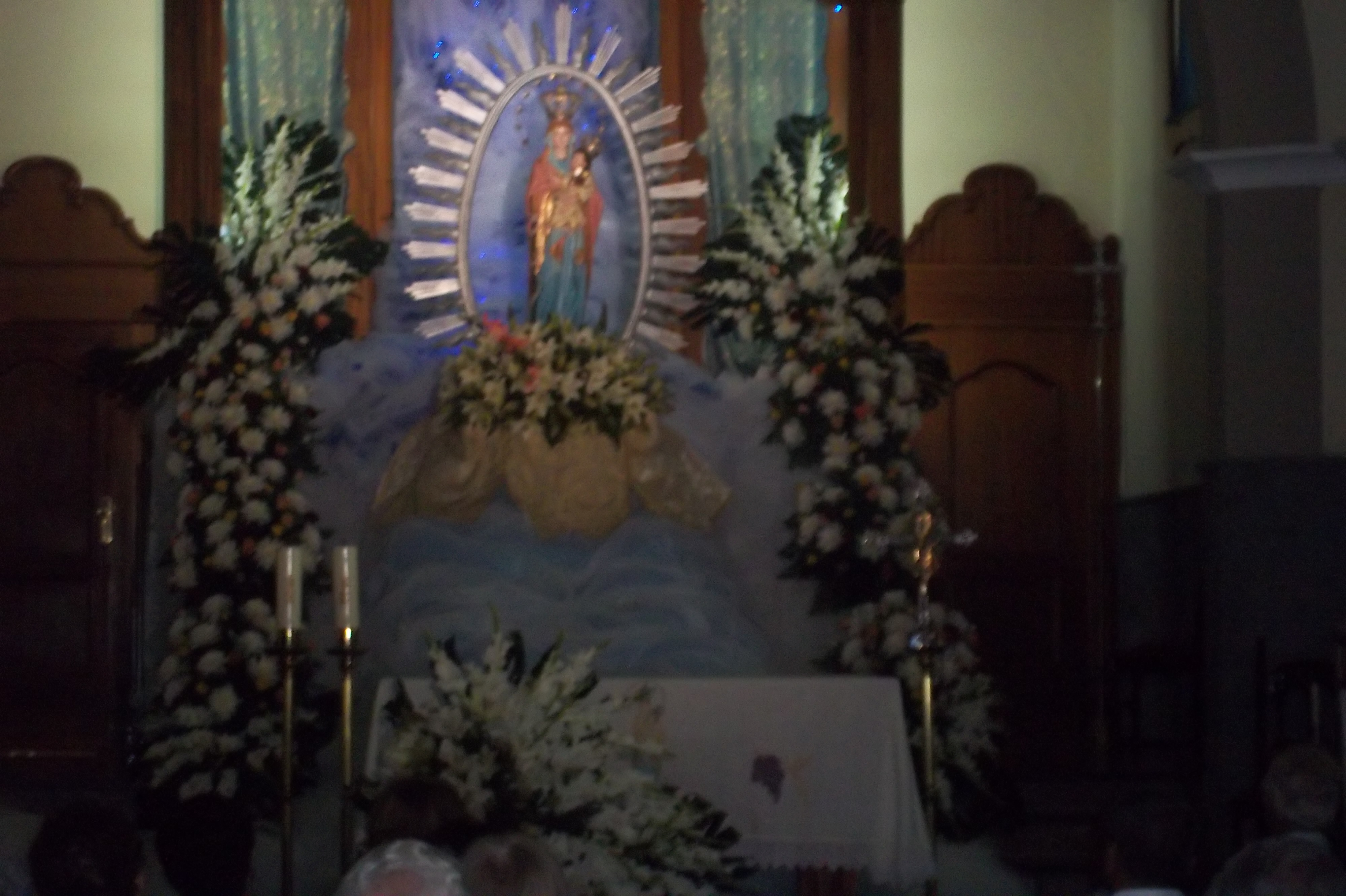 Momento de la Subida de la Virgen a su camarín entre tules y flores